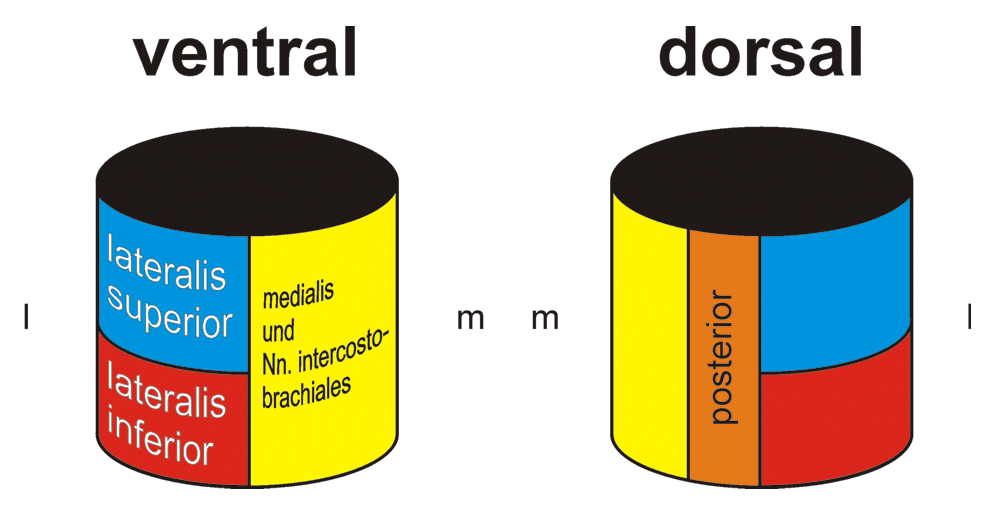 Schematische Darstellung der Hautinnervation des Oberarms